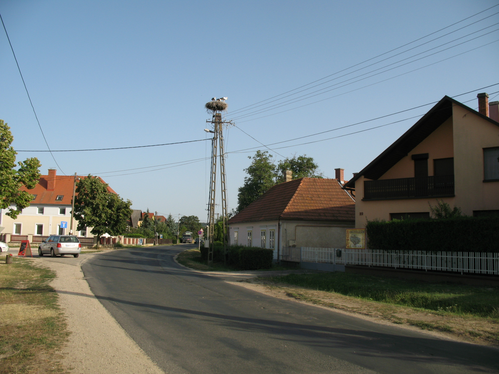 Nagyvázsony